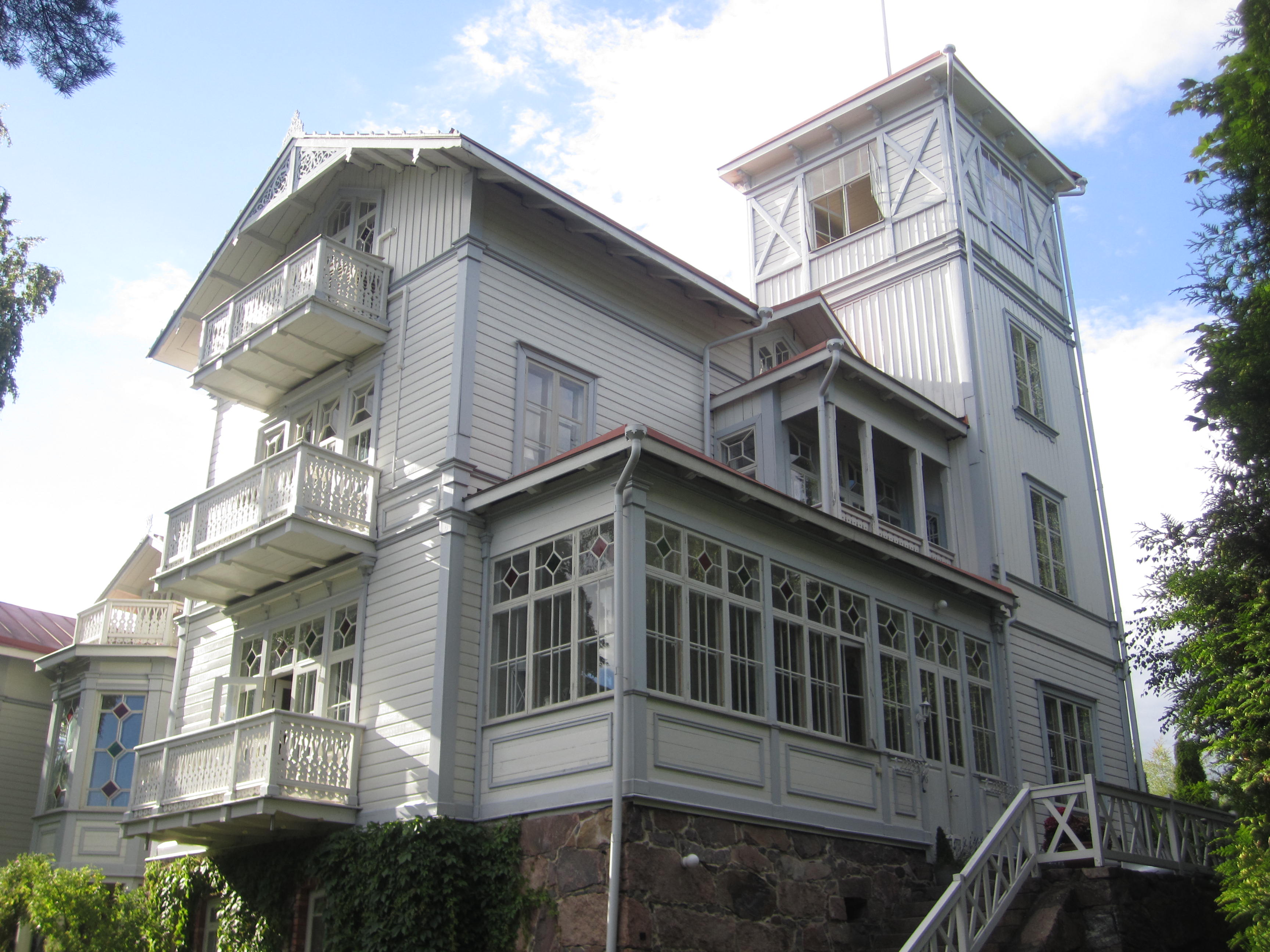 Villa Toivola -huvila Helsingin Vähä-Meilahdessa.